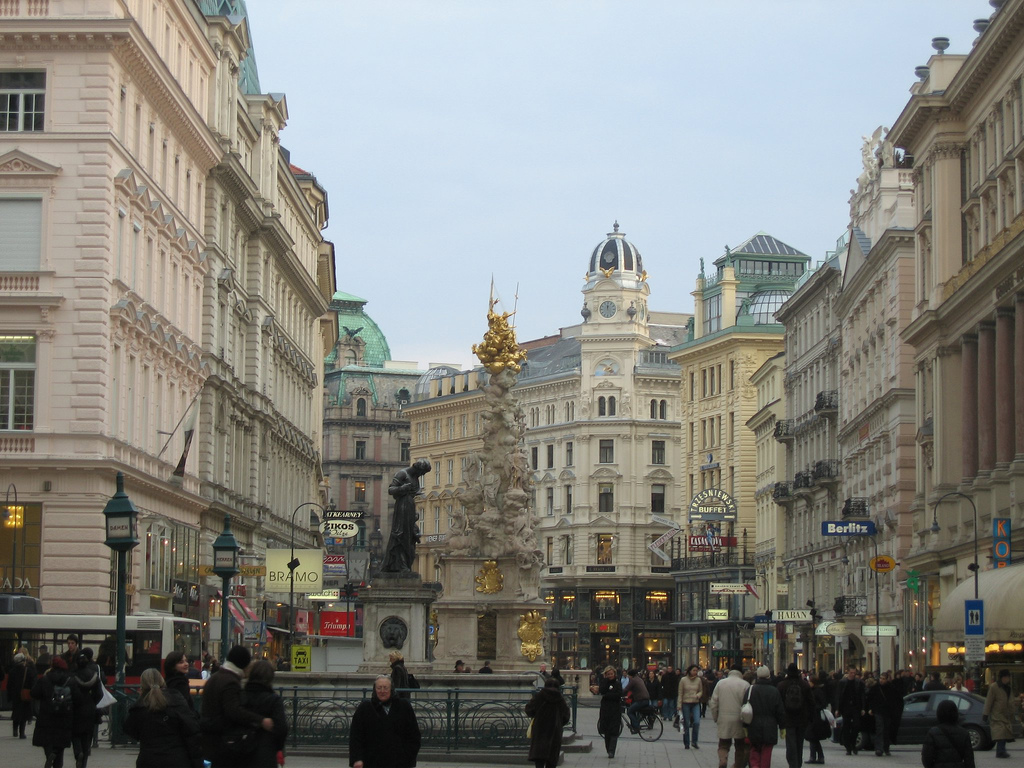 Der Graben in Wien.